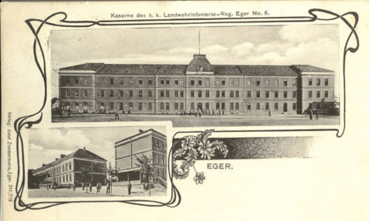 k.k. Landwehrkaserne in Eger in Böhmen